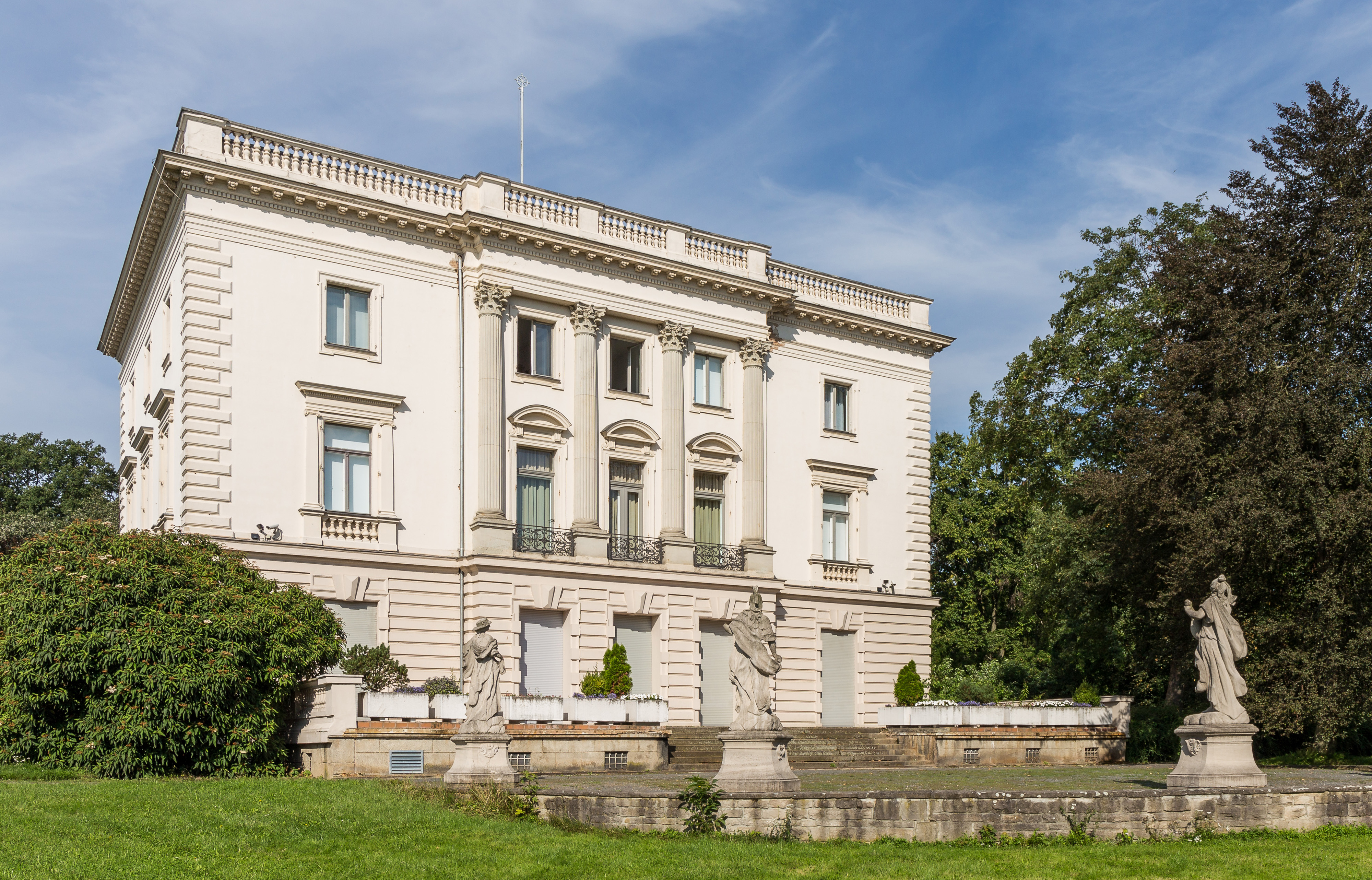 Das "Weiße Haus" auf dem agra-Gelände in Markkleeberg, Parkseite